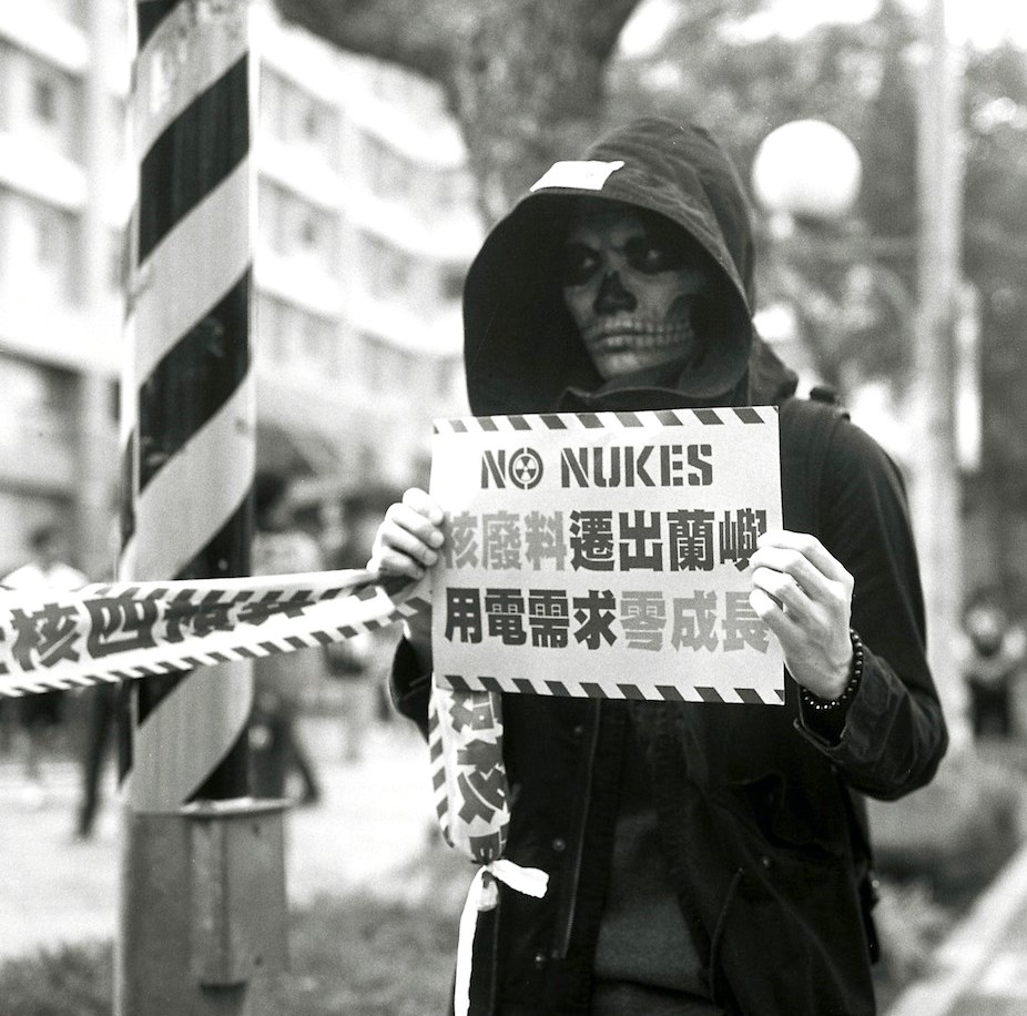 2013年3月15日